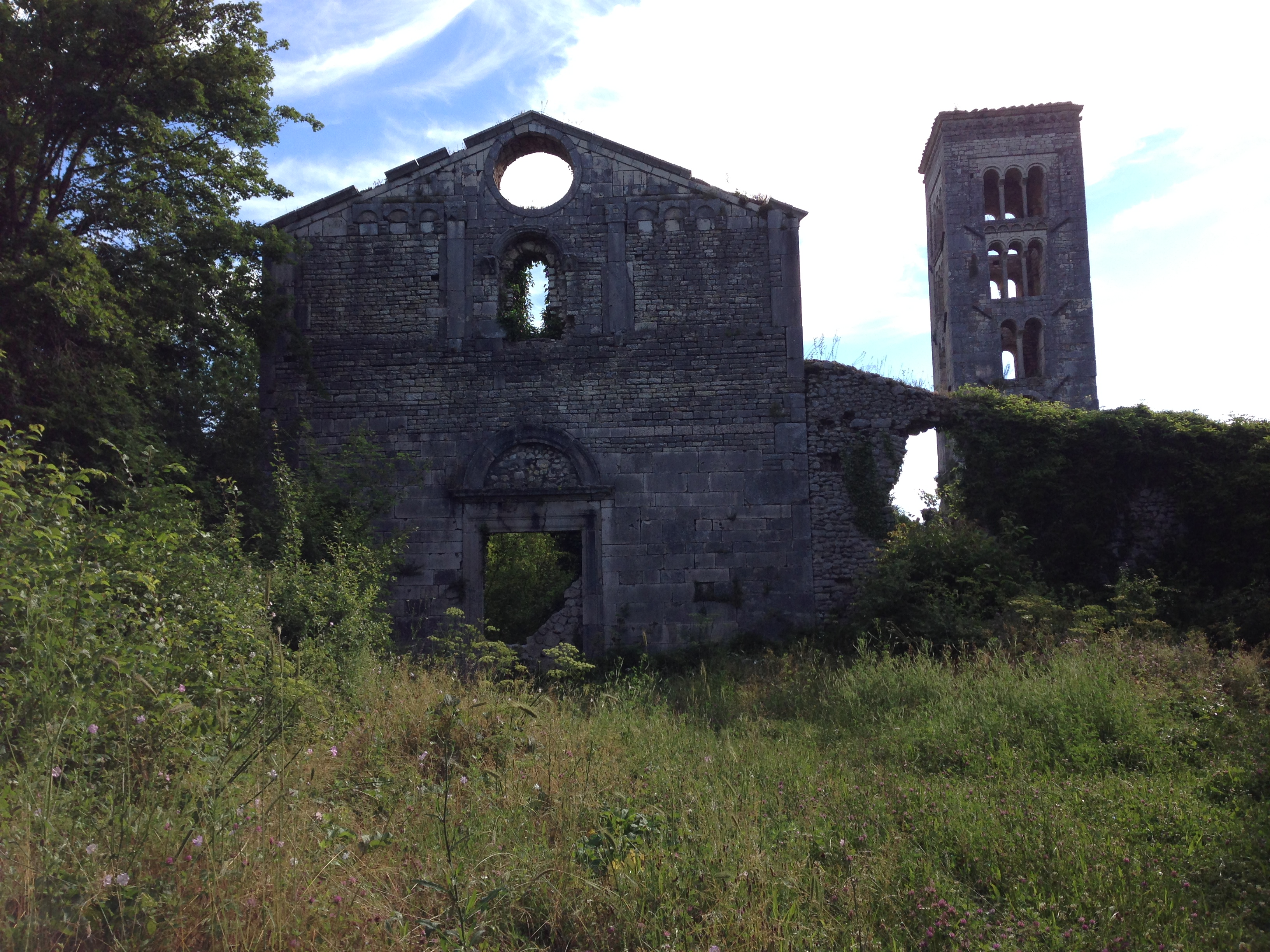 Chiesa di Santa Maria del PianoIl complesso benedettino è posto silenziosamente al bordo di un ampio e fertile piano carsico interrotto qua e là da alberi e orli di siepi. La scarna e armonica facciata della Chiesa - in pietra calcarea scurita dal tempo - i lembi di mura perimetrali, il profilo allungato e vigile del campanile romanico, spuntano quasi all’improvviso dalla vegetazione.La Chiesa è a “pianta a croce latina”, con abside semicircolare sopraelevata. La meravigliosa Torre Campanaria è caratterizzata da più ordini di apertura ed ovunque si trovano tracce che testimoniano l’esistenza di un antico convento. La struttura abbaziale poggia su un promontorio prospiciente la Valle Muzia, che la documentazione archeologica vede abitata privatamente - già in età romana - a partire dall’epoca repubblicana. La stessa struttura ecclesiastica è probabilmente costruita sui resti di una situazione archeologica complessa, che alcune teorie reputano compatibile con quella di un complesso funerario imperiale. La documentazione scritta del Monastero inizia nel Medio – Evo con il regesto farfense: in due documenti datati 1026 e 1062, Santa Maria de Putealia compare non come proprietà dell’Abbazia di Farfa, ma come elemento confinario a se stante e già dotato di un nucleo fondiario privato. This is a photo of a monument which is part of cultural heritage of Italy.